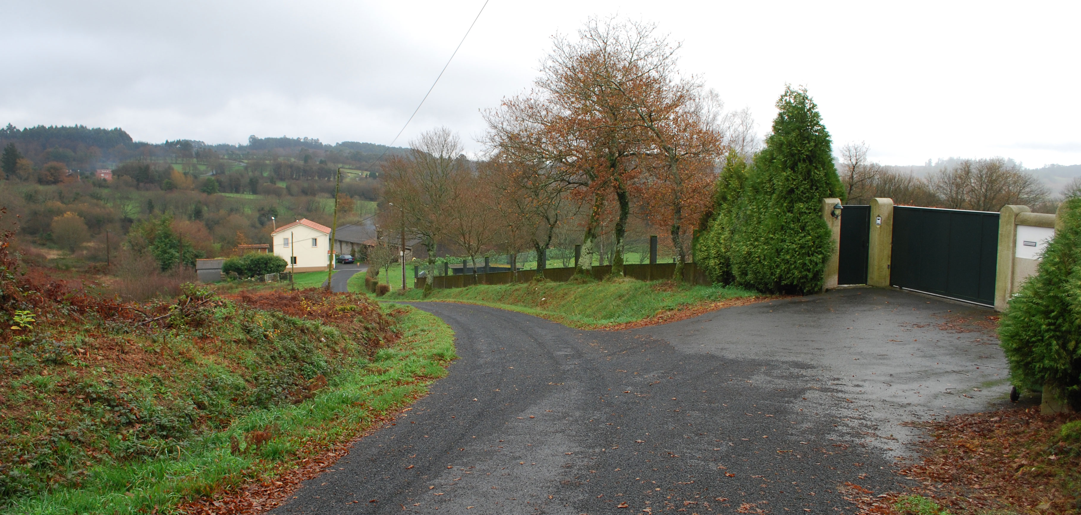 Lugar de Meilá Barbeito Concello de Vilasantar A Coruña Galiza Spain wGL